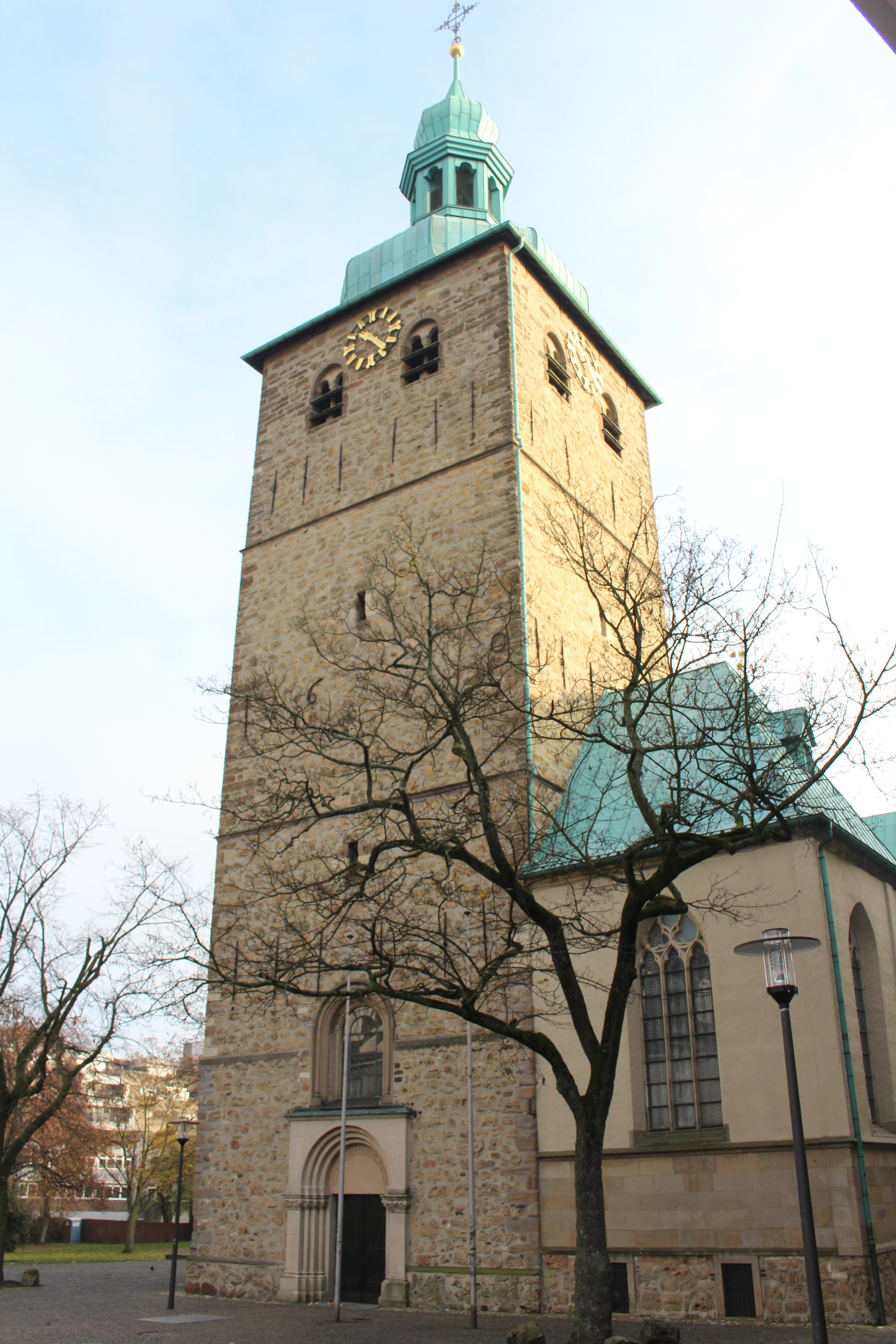 Sankt Peter Recklinghausen